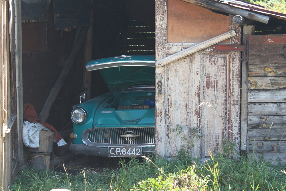 Auffinde-Situation eines sog. Scheunenfundes. Im Bild Opel Olympia Rekord P1, Baujahr 1958. Im Motorraum div. Pflanzen nach mehrjährigem Stillstand Abgebrochene Restauration nach finanziellem Engpaß